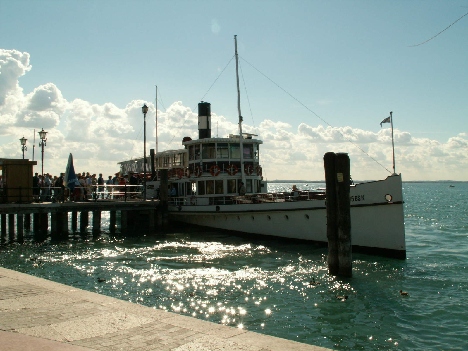 Lazise Schiff